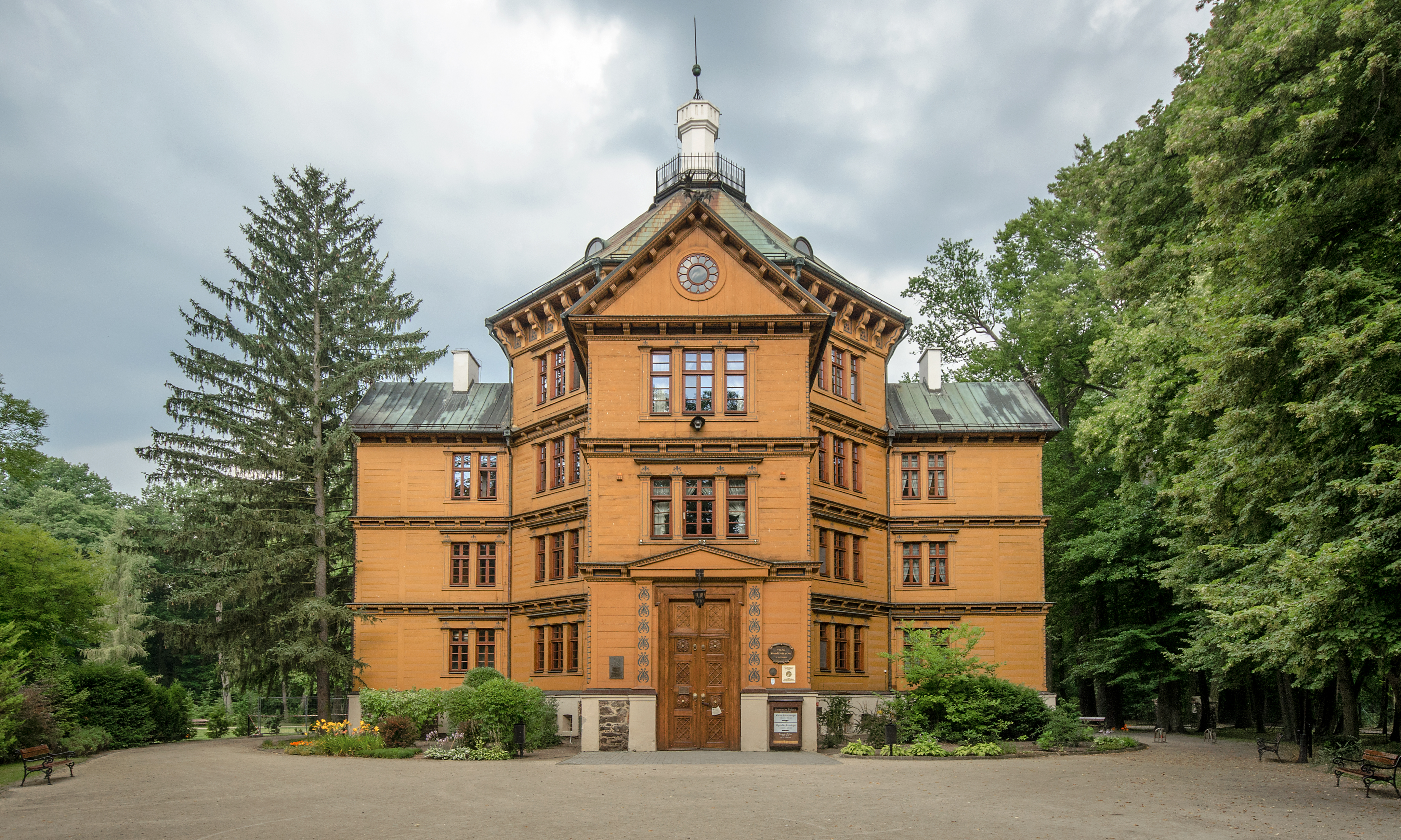 Antonin, pałac myśliwski, 1 poł. XIX